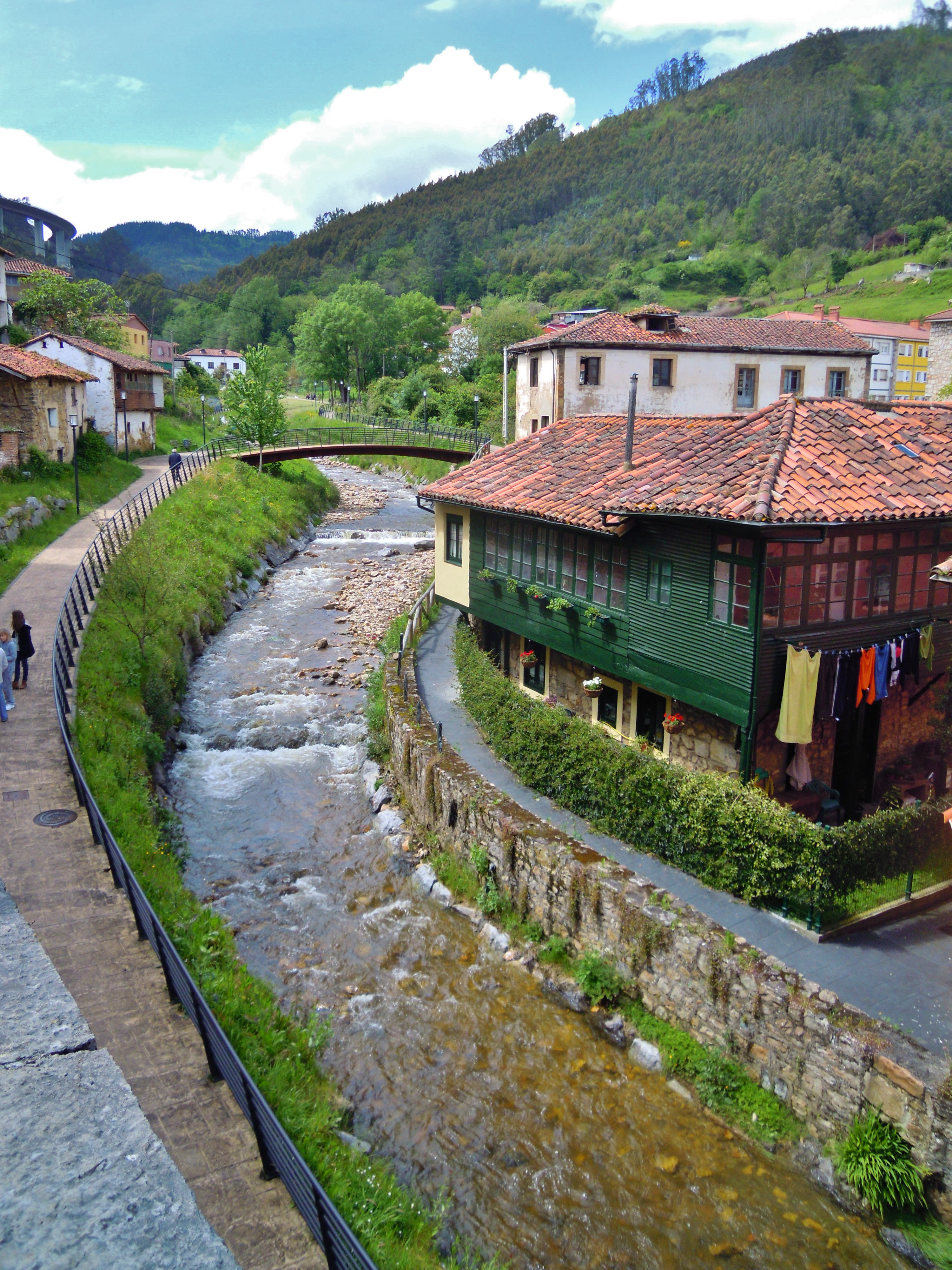 El ríu Nonaya (Salas)